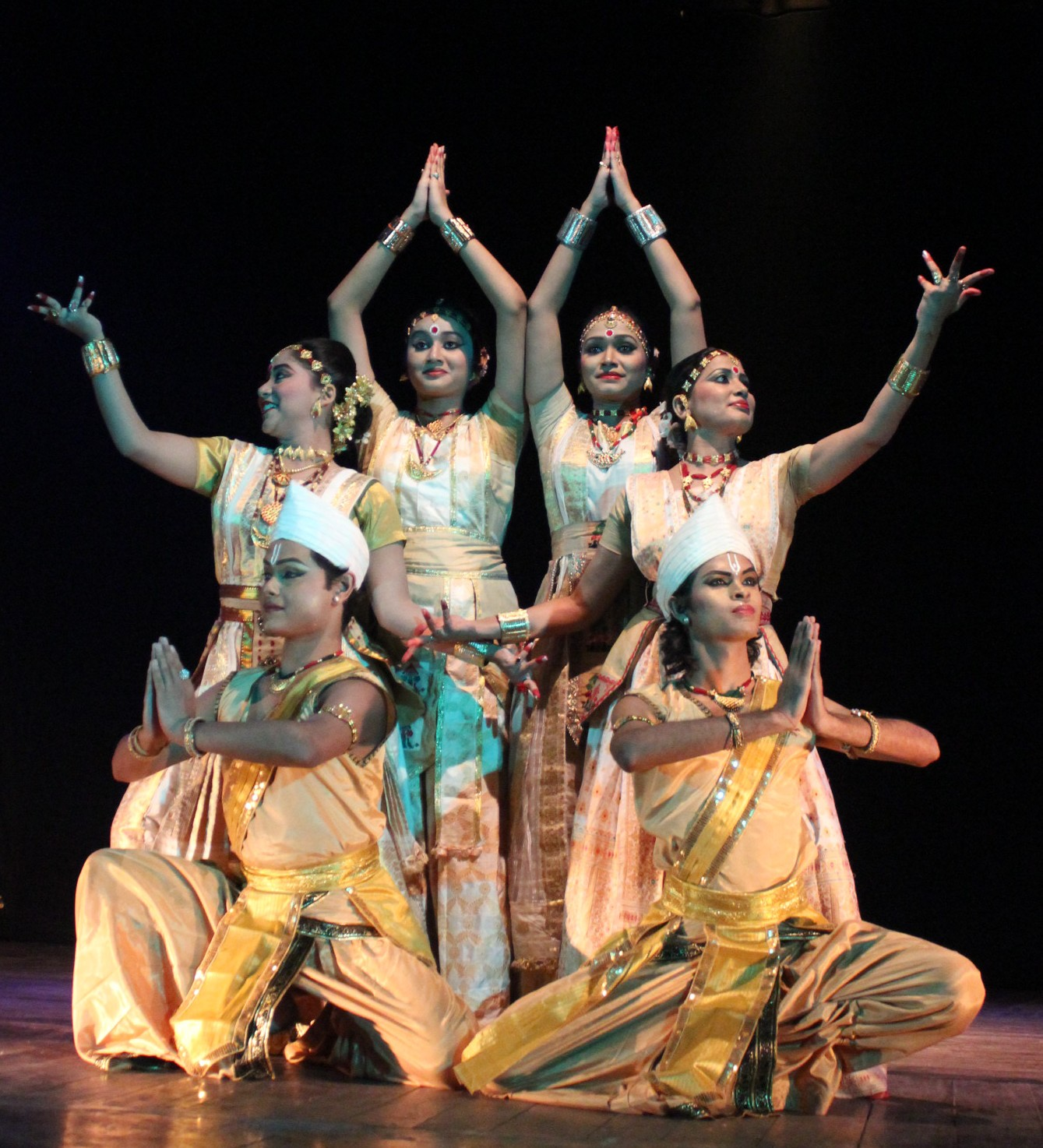 অসমীয়া: গুৱাহাটীৰ ৰবীন্দ্র ভৱনত সঙ্গীত নাটক আকাদেমিৰ গুৱাহাটী শাখাৰ দ্বাৰা আয়োজিত ‘নৃত্য পর্ব’ অনুষ্ঠানত (১৫-১১-২০১১)সত্রীয়া নৃত্য পৰিবেশনাৰ এটি দৃশ্য।